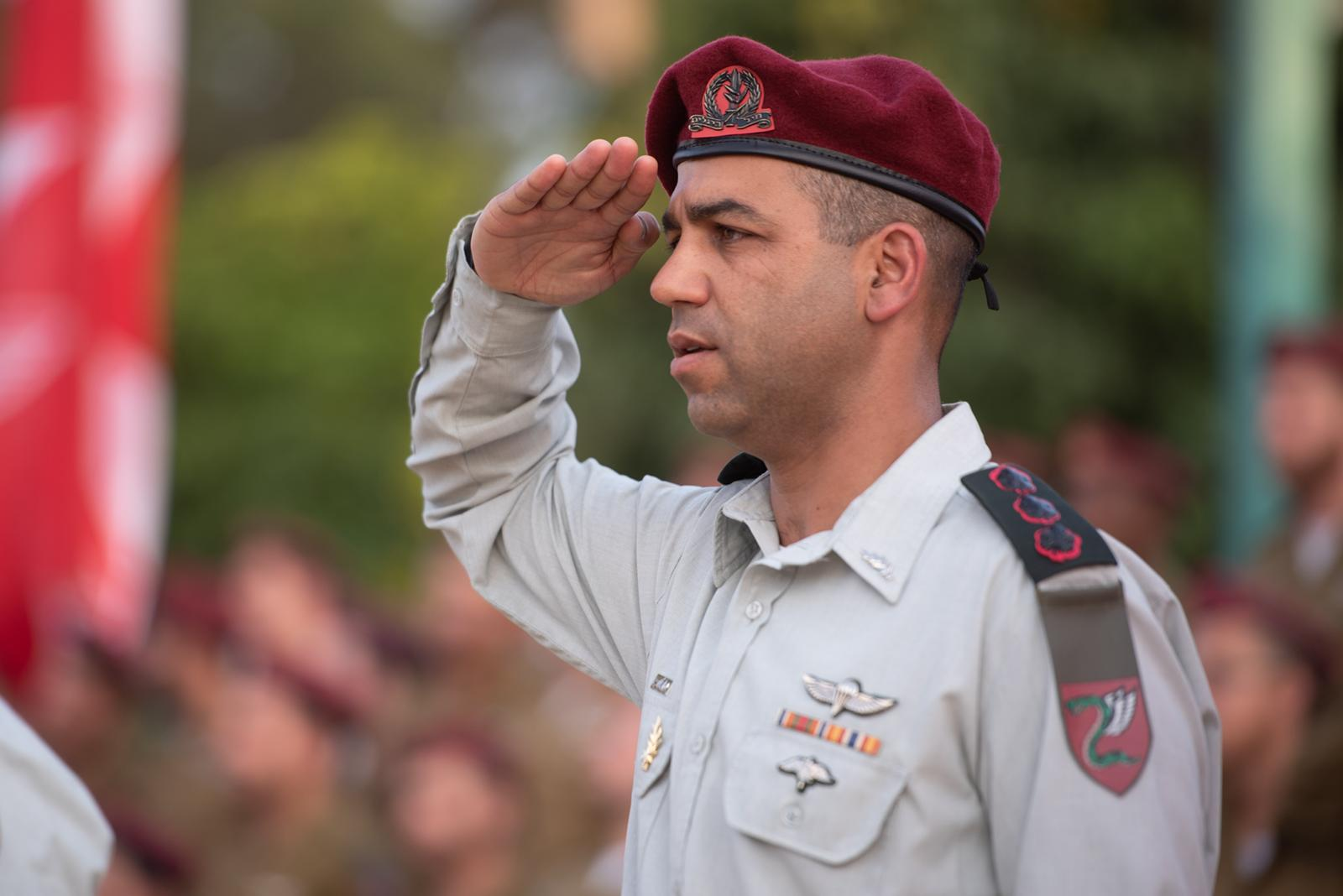 טקס החלפת מח"ט צנחנים. טקס החילופים נערך במחנה "בית- ליד", במעמד מפקד פיקוד המרכז, אלוף נדב פדן, מפקד עוצבת "האש", תת-אלוף ירון פינקלמן, מפקדים, לוחמים, בני משפחה ומוזמנים נוספים. אל"ם יובל גז מחליף בתפקידו את אל"ם יעקב (יקי) דולף, אשר כיהן בתפקיד זה במהלך השנתיים האחרונות.